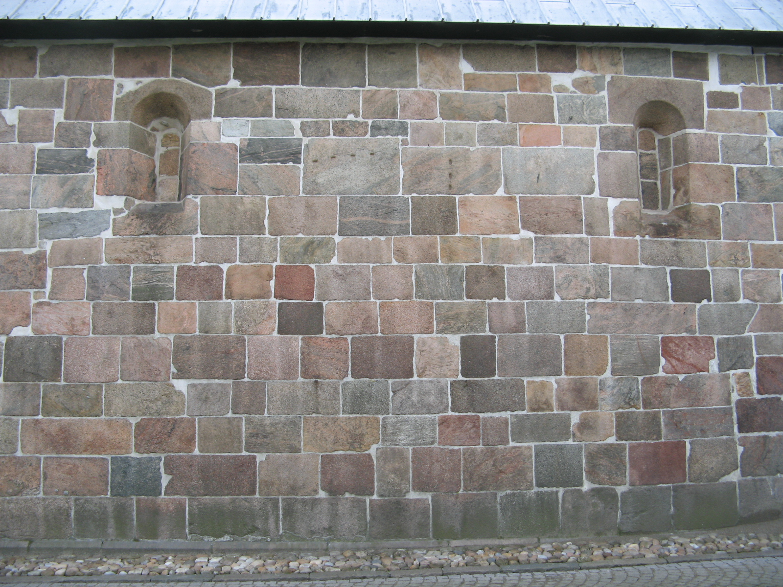 Jerne Kirke, Jerne sogn, Esbjerg kommune (former: Skads Herred, Ribe Amt). Jerne Kirke - romanske vinduesnicher i skibets nordvæg.